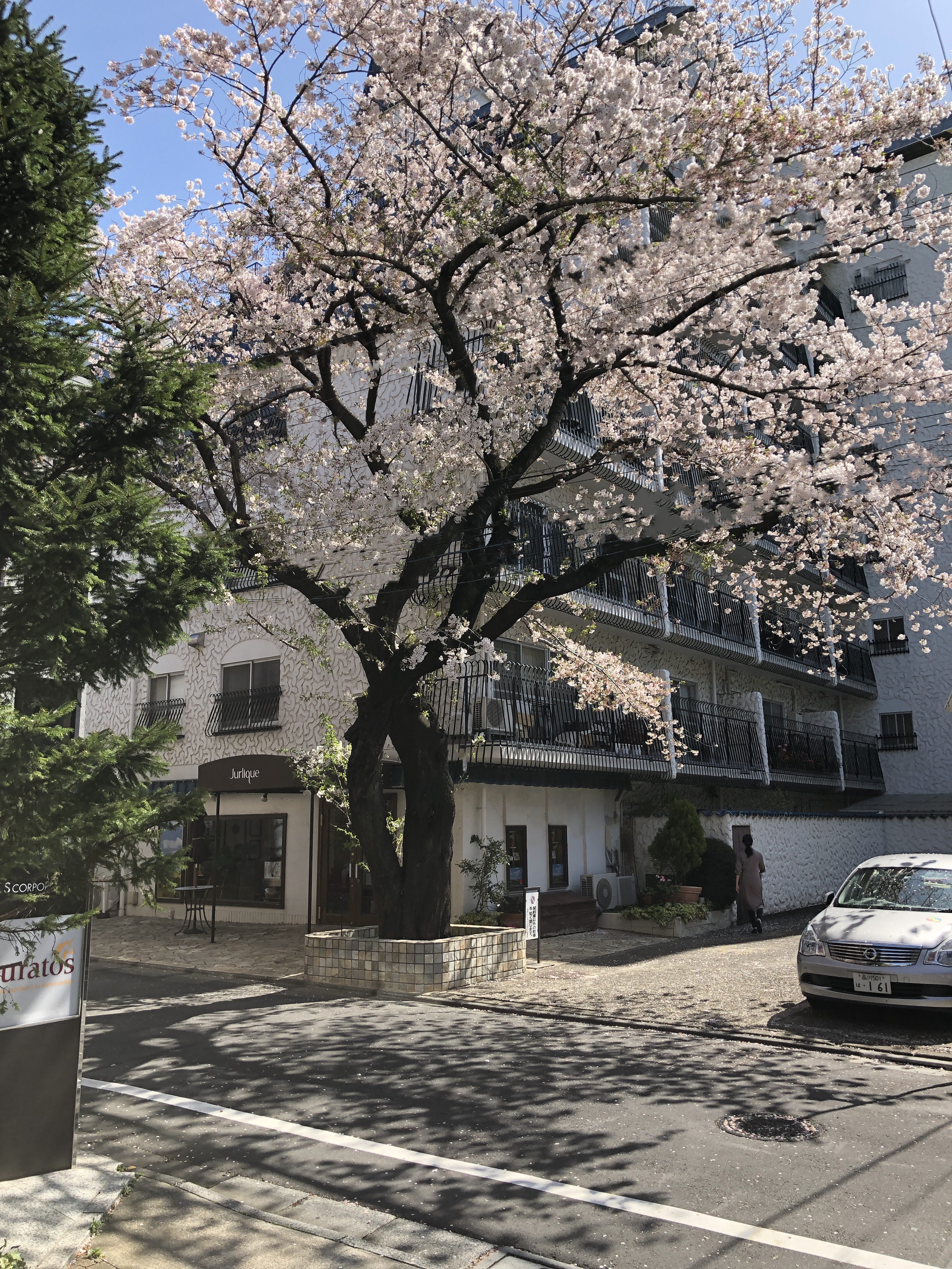 ゼロリノベ外苑前オフィスの外観